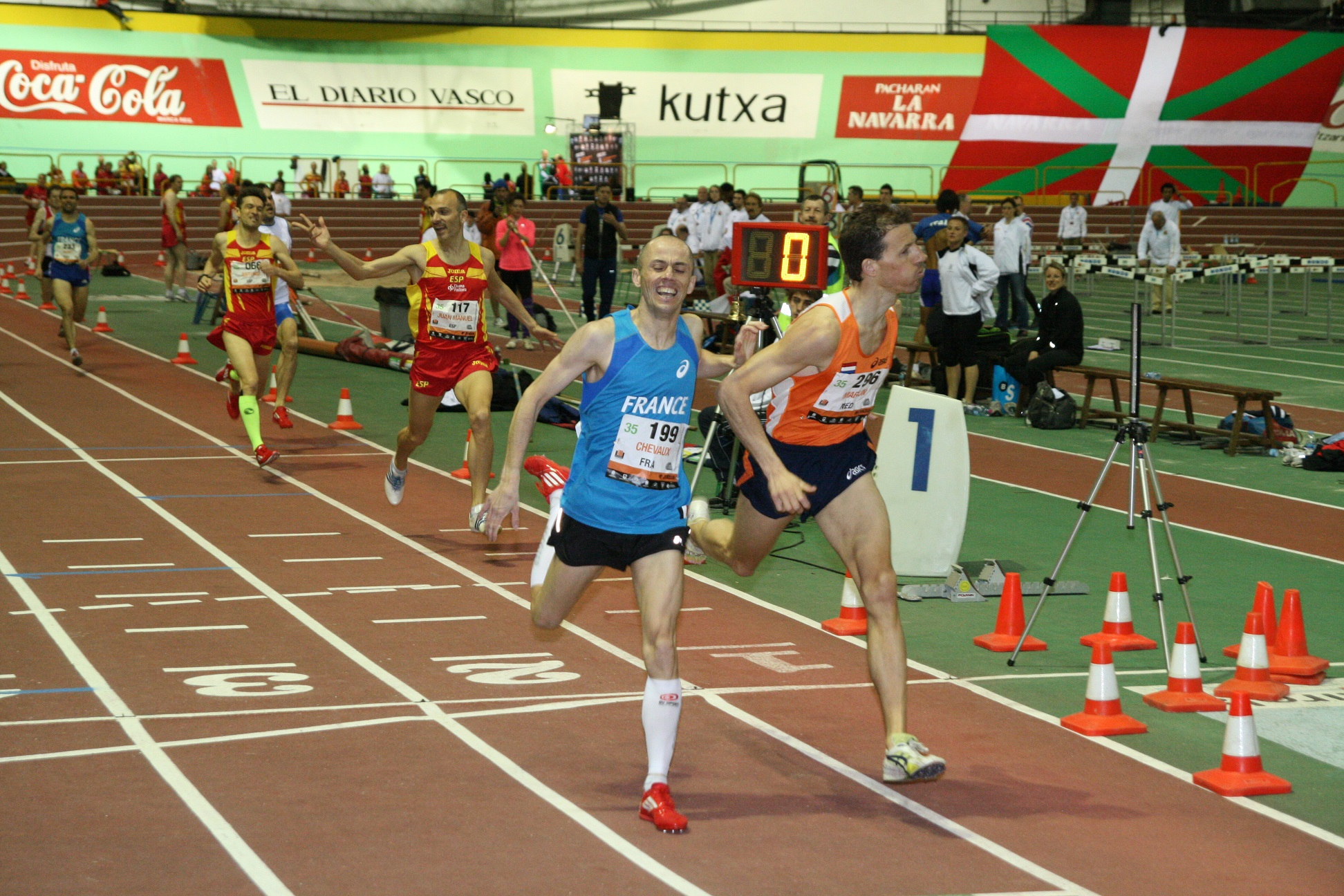 Finale Championnat d'Europe 2013 800m San Sebastian